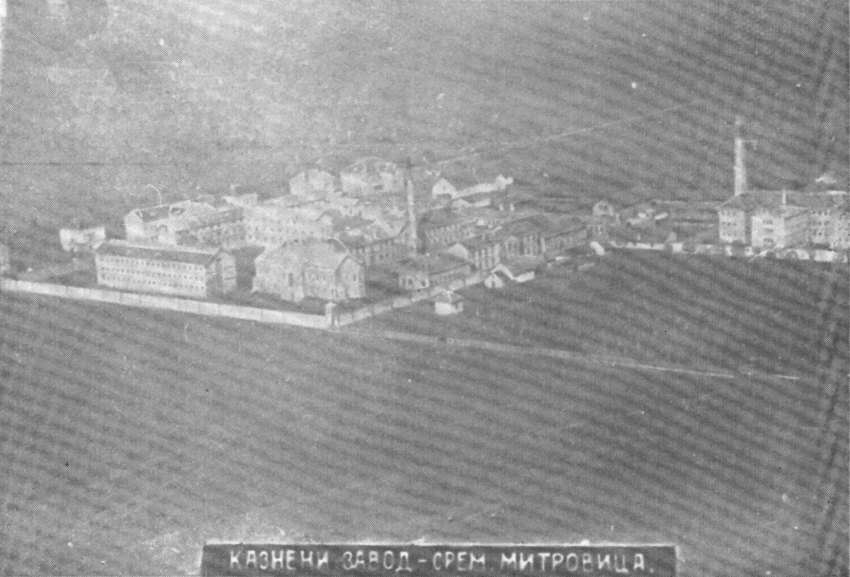 Srpskohrvatski / српскохрватски: Kazneni zavod Sremska Mitrovica